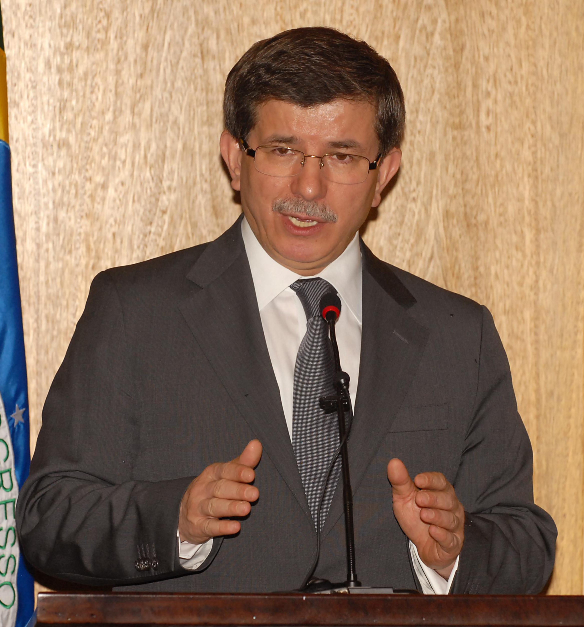 Brasília - O ministro dos Negócios Estrangeiros da Turquia, Ahmet Davutoğlu, concede entrevista coletiva, após encontro com o ministro das Relações Exteriores do Brasil, Celso Amorim (Renato Araújo/ABr)